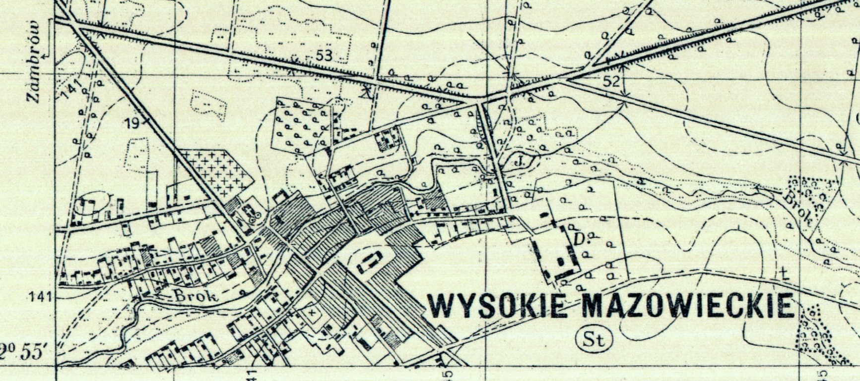 Jest to fragment mapy Wysokiego Mazowieckiego z 1933 roku (powiat Wysokie Mazowieckie, woj. białostockie). Południowa część miasta znajduje się na mapie Szepietowa Pas 37 Słup 35 E.